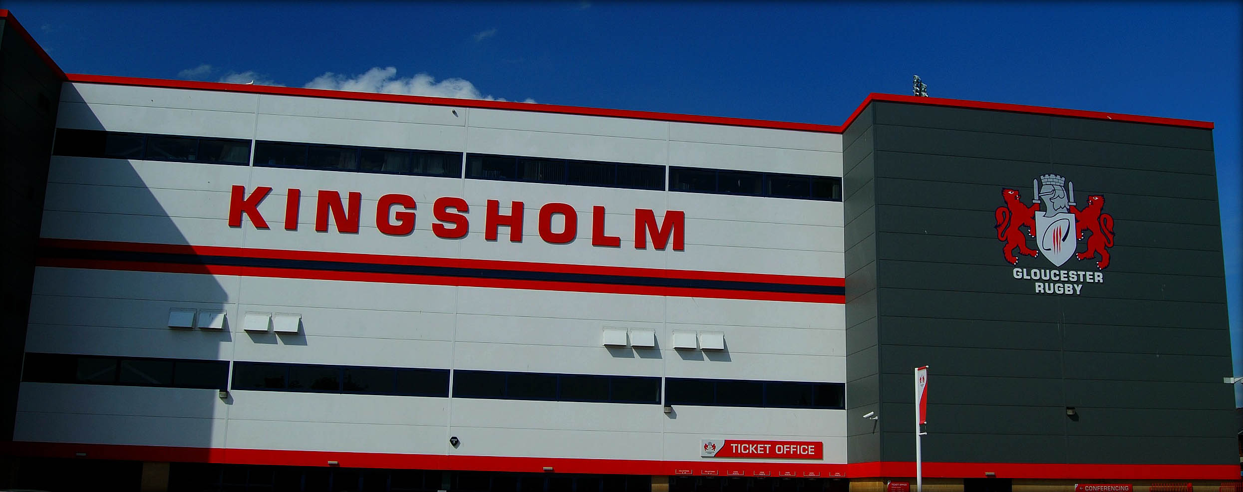 Gloucester, Kingsholm.